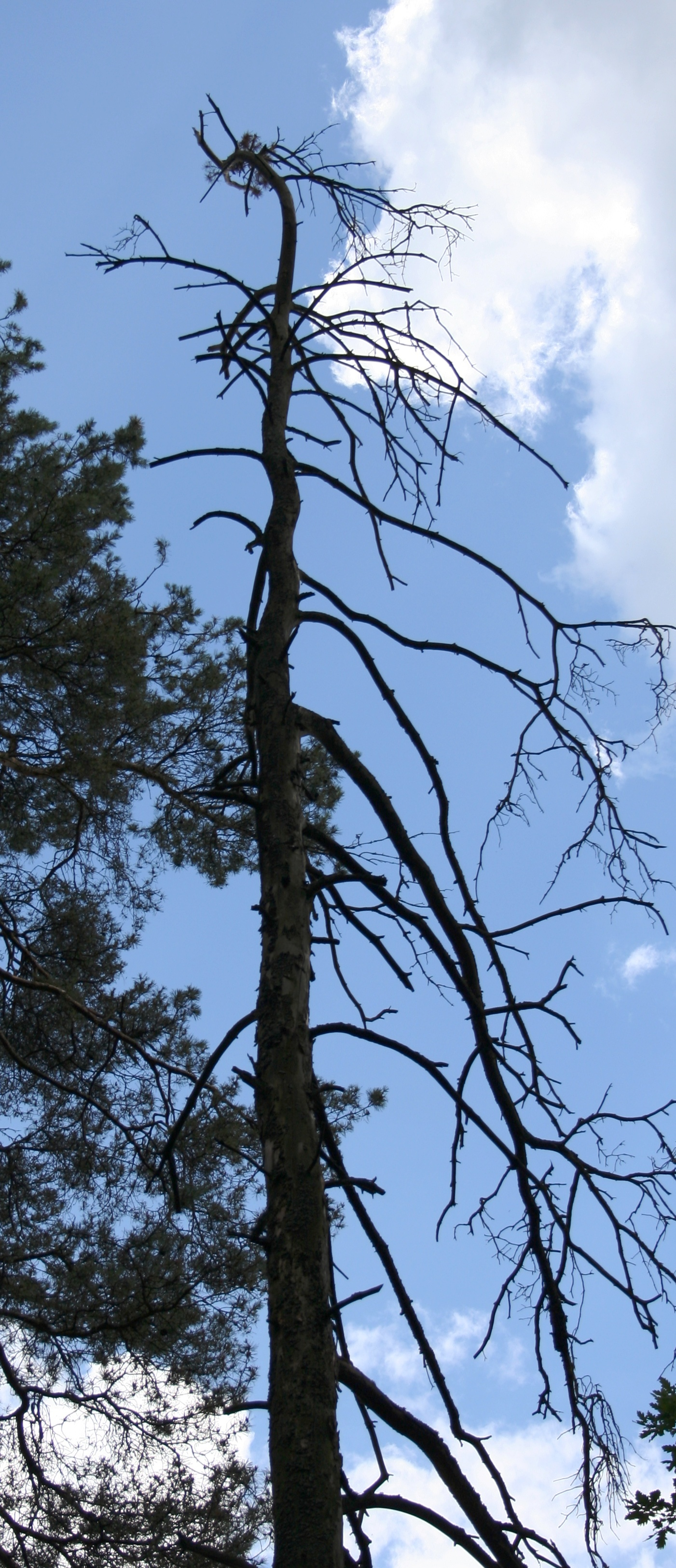 Posusz ekologiczny - pień drzewa, miejsce startu orłów bielików